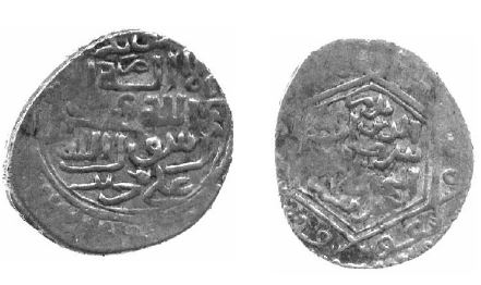 Botan Emiri Bedreddîn b. Şerafeddîn döneminde kendi adına bastırdığı para